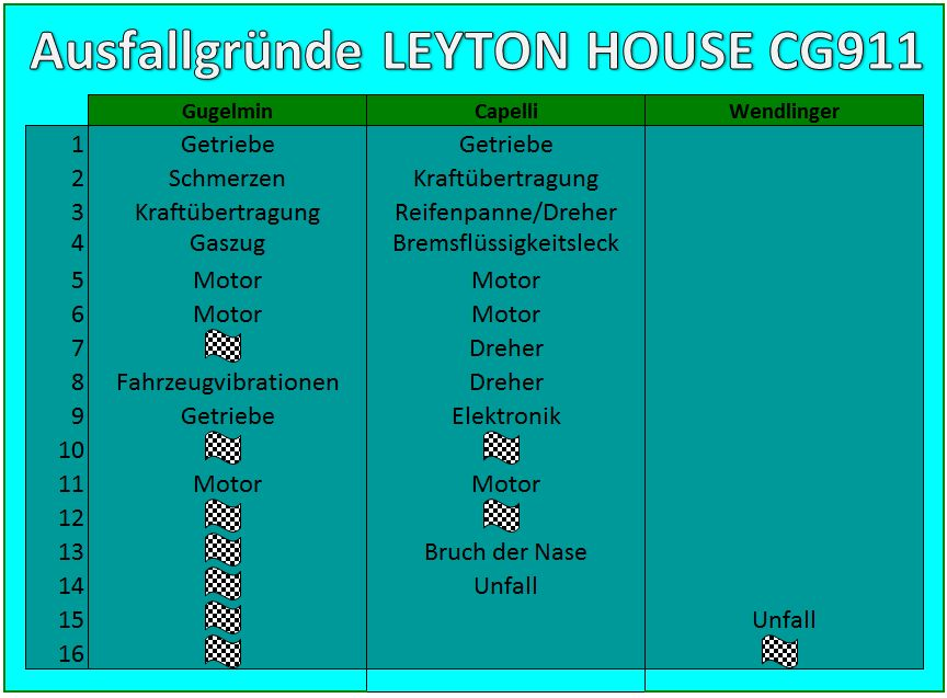 Ausfallgründe des F1 Leyton House Teams 1991